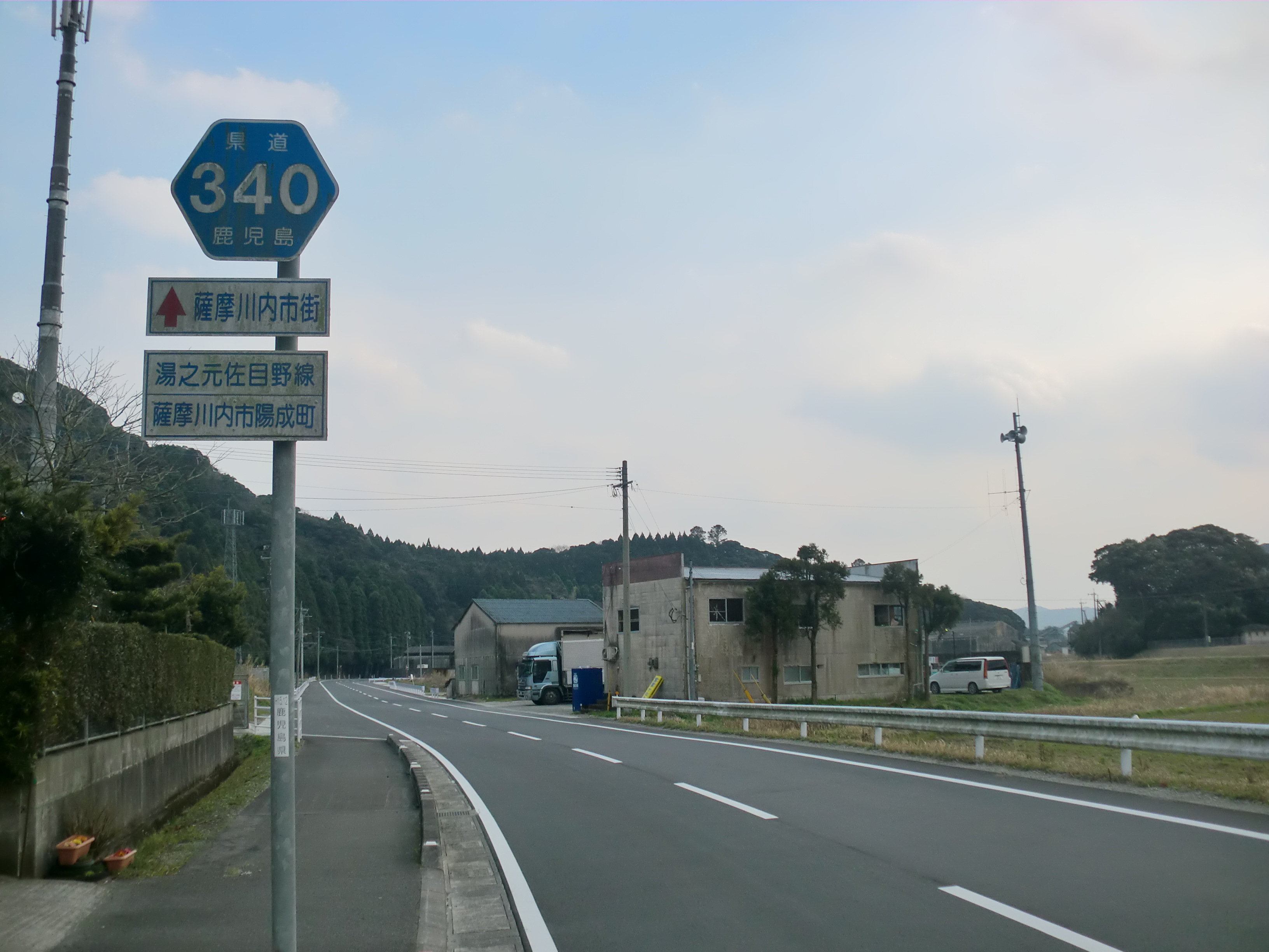 鹿児島県道340号湯之元佐目野線。薩摩川内市で撮影。